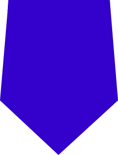 Patka lotnictwa używana w latach 1952-1960